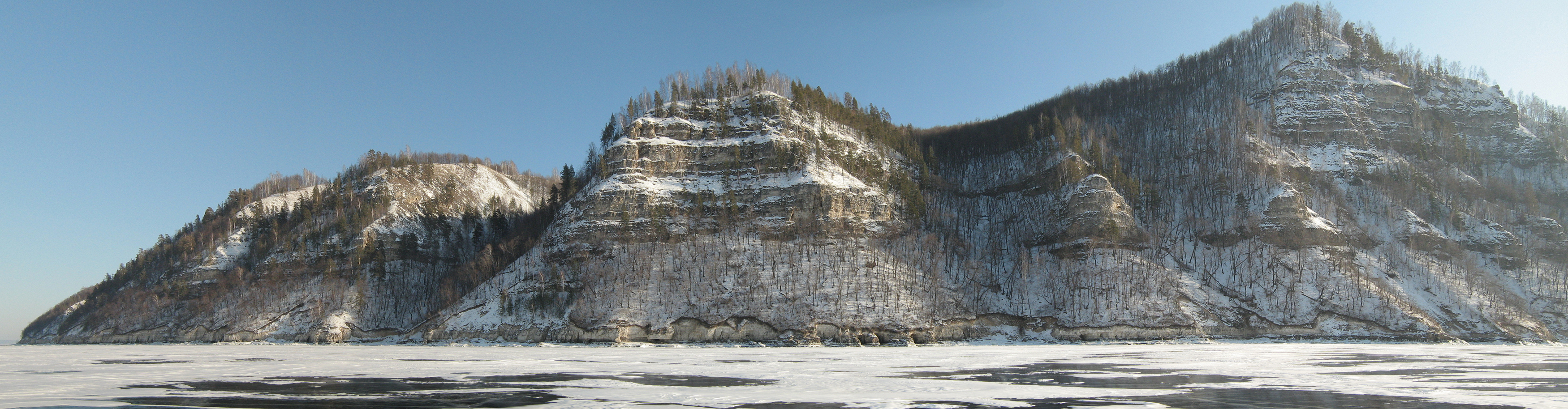 Массив Жигулёвских гор между Мо́лодецким курганом и Яблоневым оврагом. Вид с Куйбышевского водохранилища. Панорама.